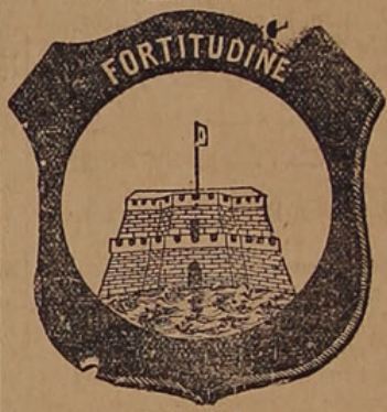 Brasão da Cidade de Fortaleza